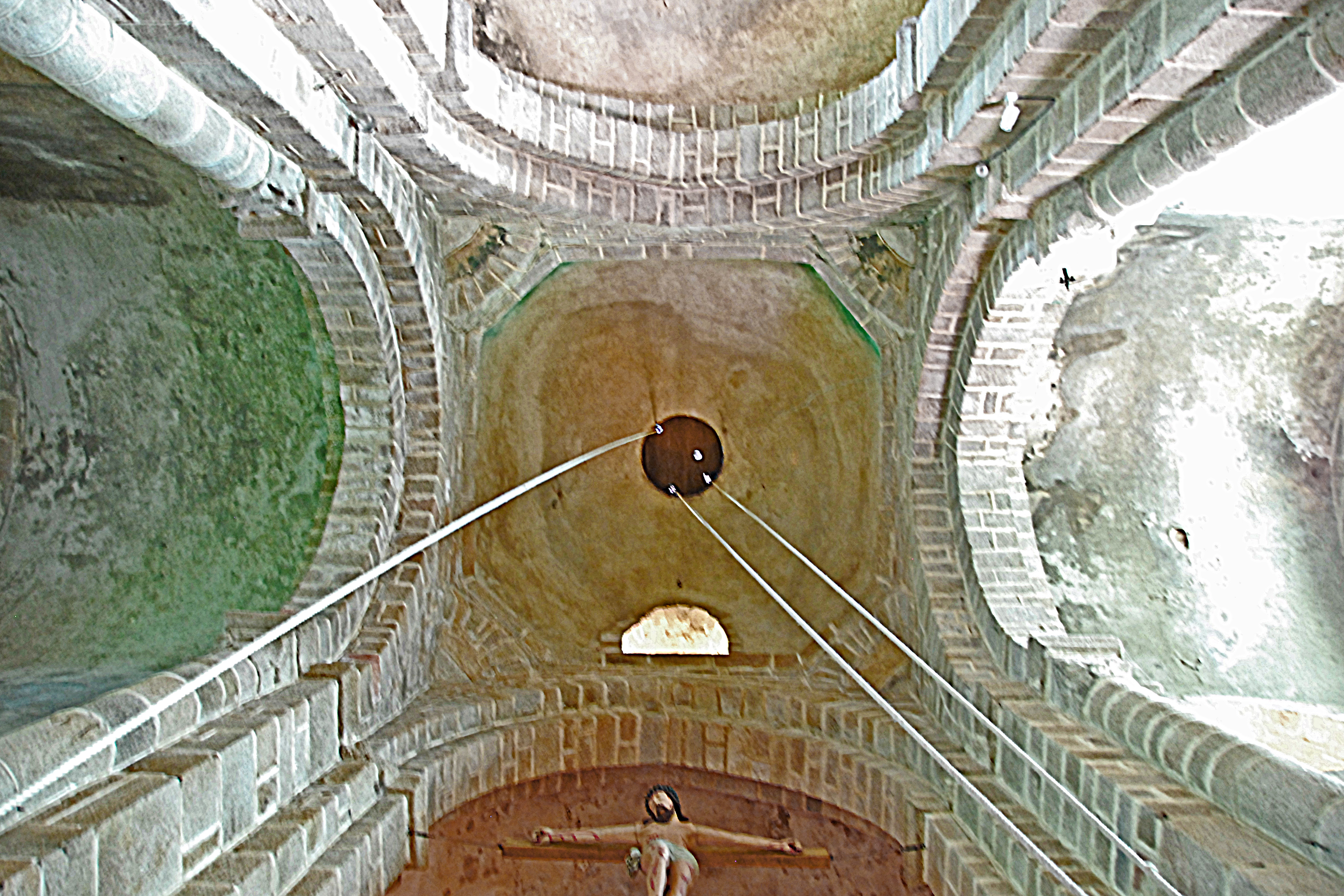 N.-D. de Châtel-Montagne, Vierungskuppel von unten